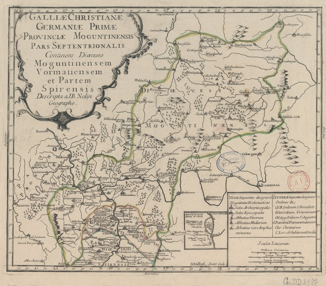 Carte de l'ancienne province ecclésiastique de Mayence, insérée dans la Gallia Christiana (1715/1759).